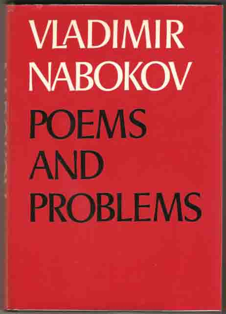 Обложка книги "Poems and Problems" В. Набокова 1969 года Изд-ва McGraw-Hill